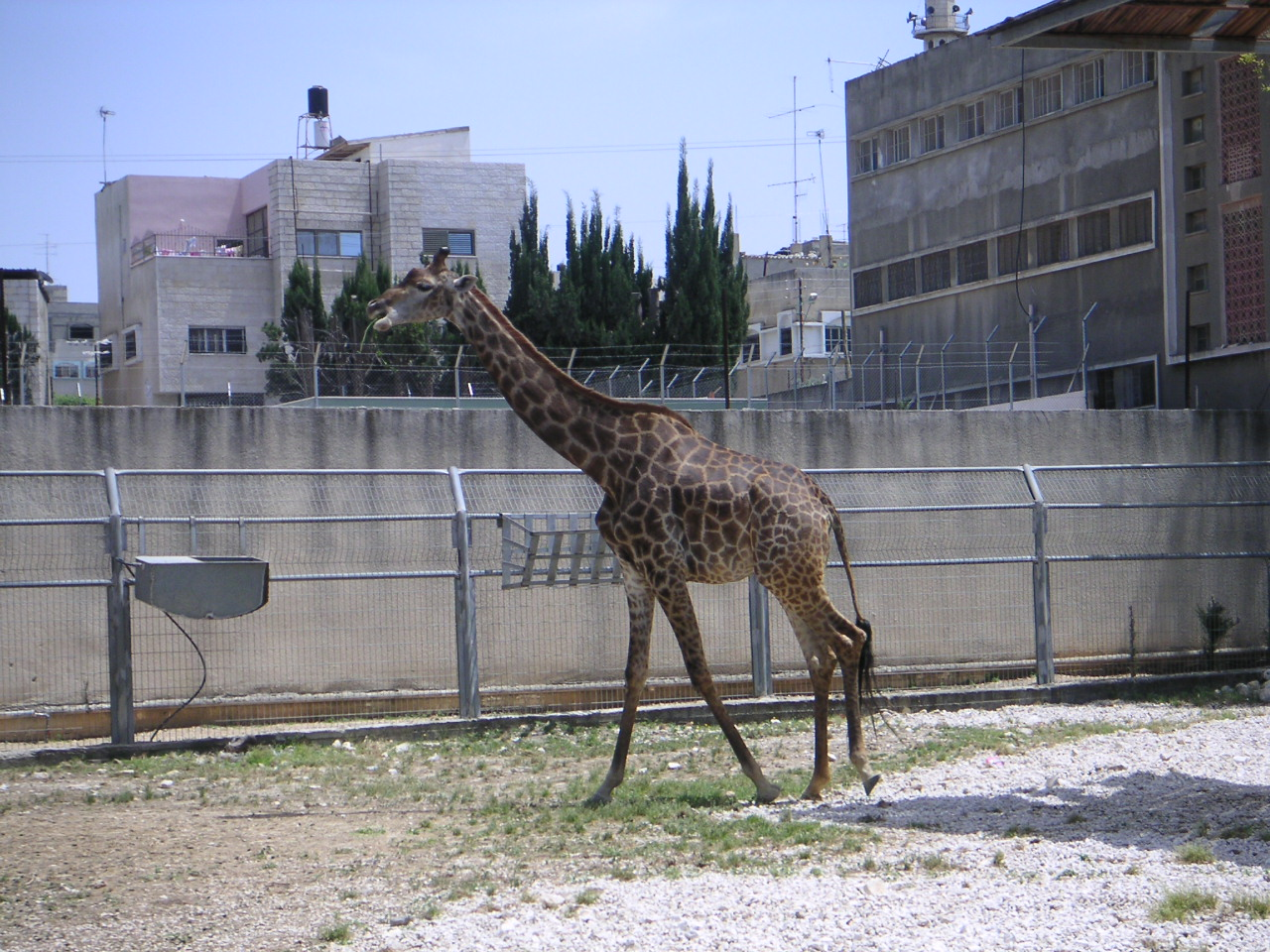 Giraffa camelopardalis